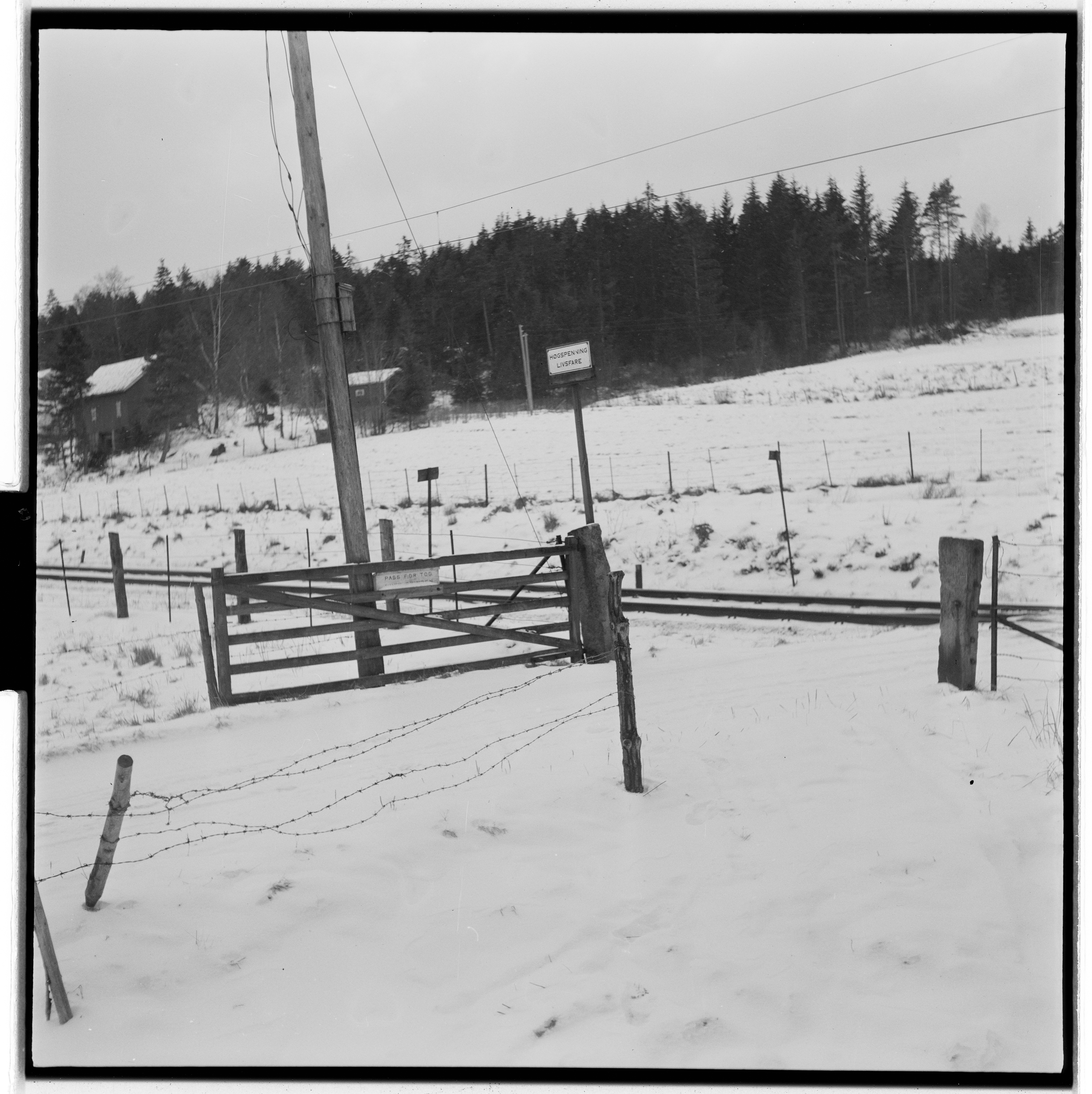 Bildet er hentet fra Arkivverket. Foto tatt i forbindelse med reportasje om planoverganger. Arkivinstitusjon : Riksarkivet Arkivnavn : Billedbladet NÅ Sted : Norge, Ukjent, Ukjent, Ukjent Emneord: Trafikk Avbildet